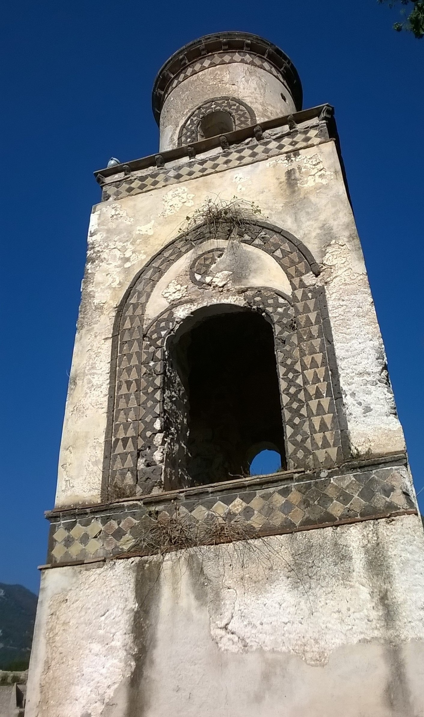 Il Campanile dell'Annunziata nella frazione di Torre, Minori (SA)